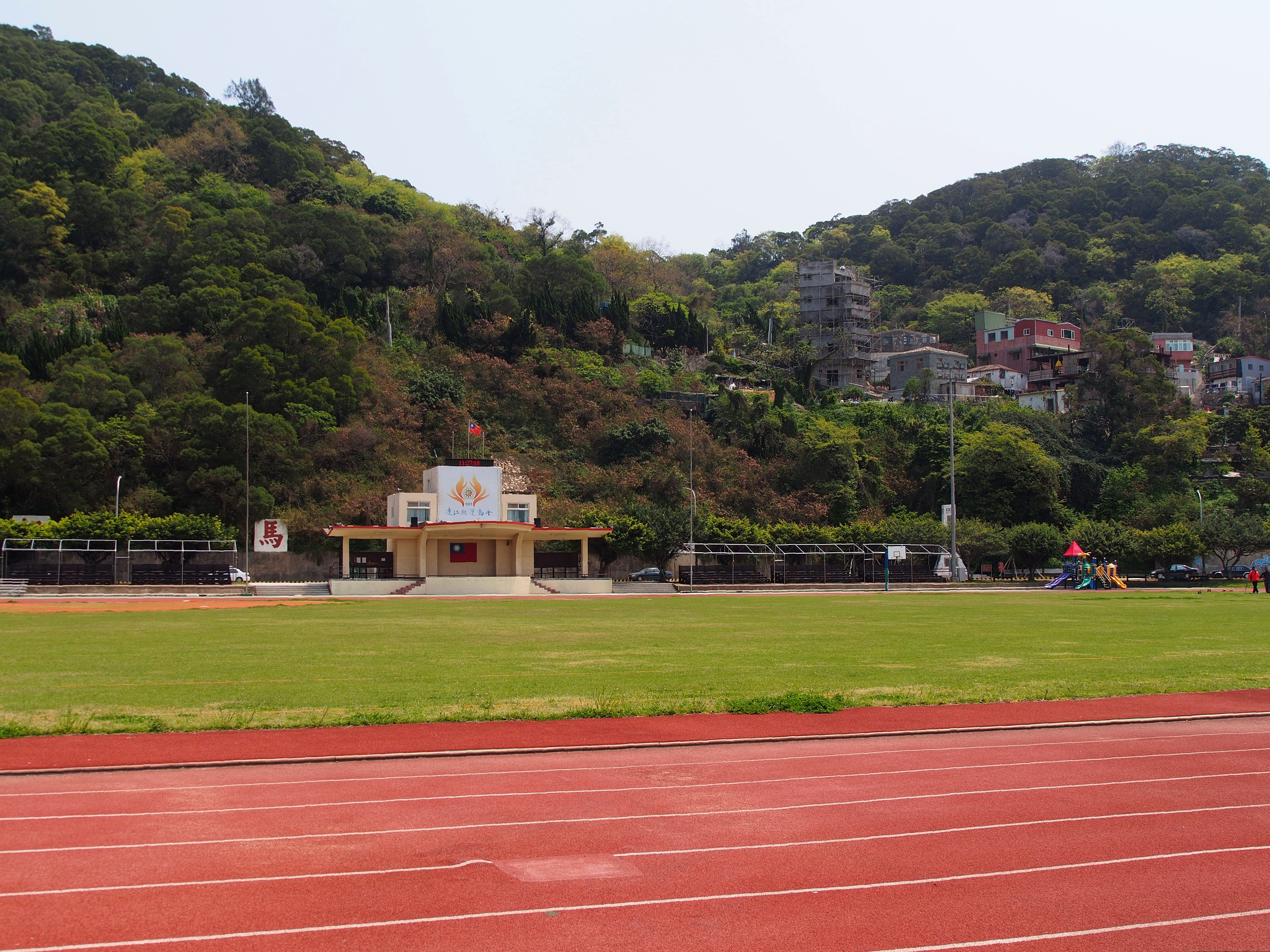 福澳運動場，位於中華民國福建省連江縣南竿鄉，為連江縣運動會舉辦地。舊司令台為海砂屋，1985年建造，2017年12月拆除重建。新司令台於2018年9月26日完工。